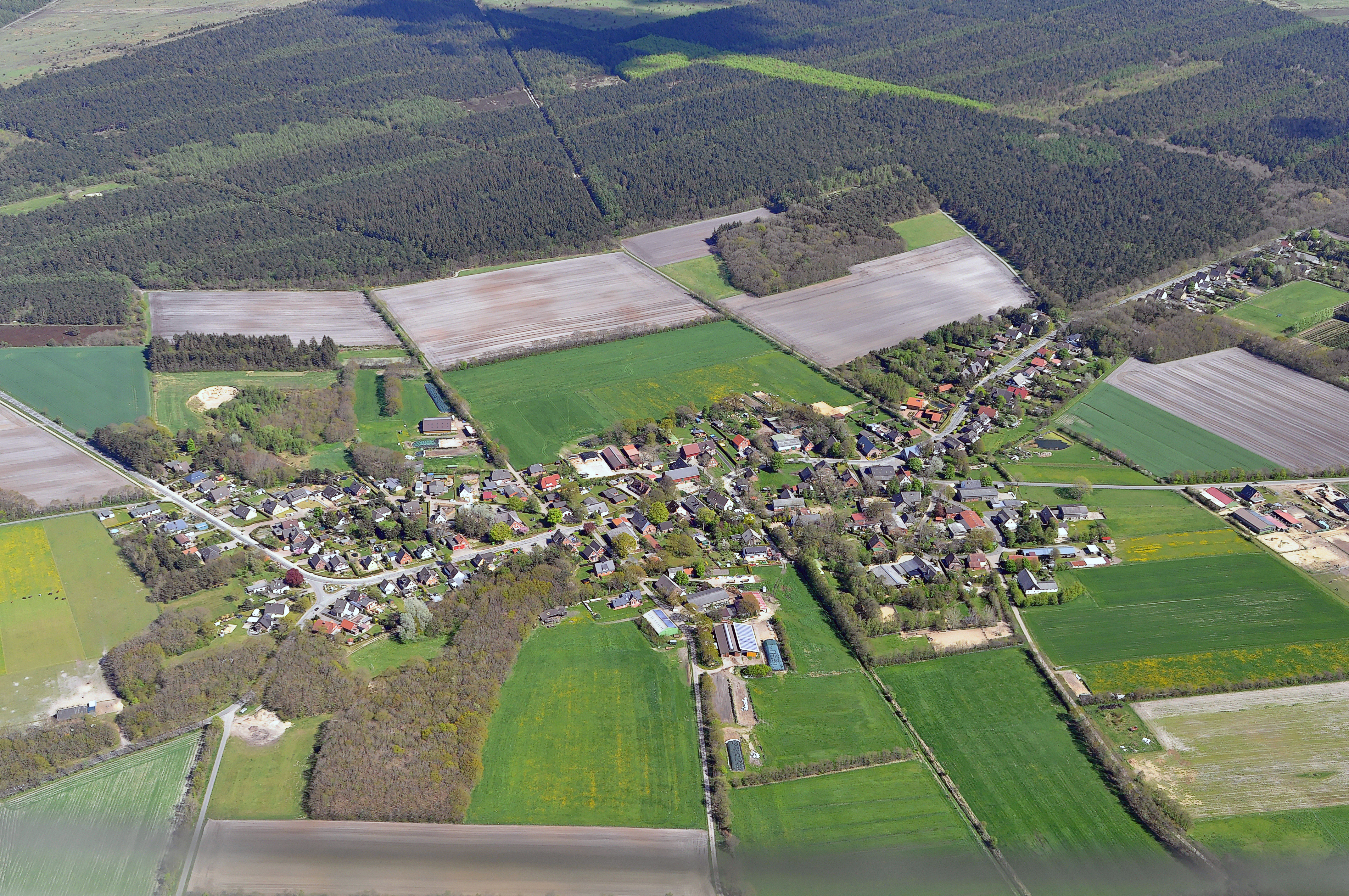 Luftbilder von der Nordseeküste 2012-04 Dieses Foto entstand aufgrund eines Projektes, das von Wikimedia Deutschland e. V. gefördert wurde. Im Rahmen des „Community-Projektbudgets“ sollen Luftbilder u.a. von Inseln, Halligen, Sanden und Küstenstädten der deutschen Nordseeküste angefertigt werden. Das Projekt „Fotoflüge“ wurde im September 2011 begonnen.